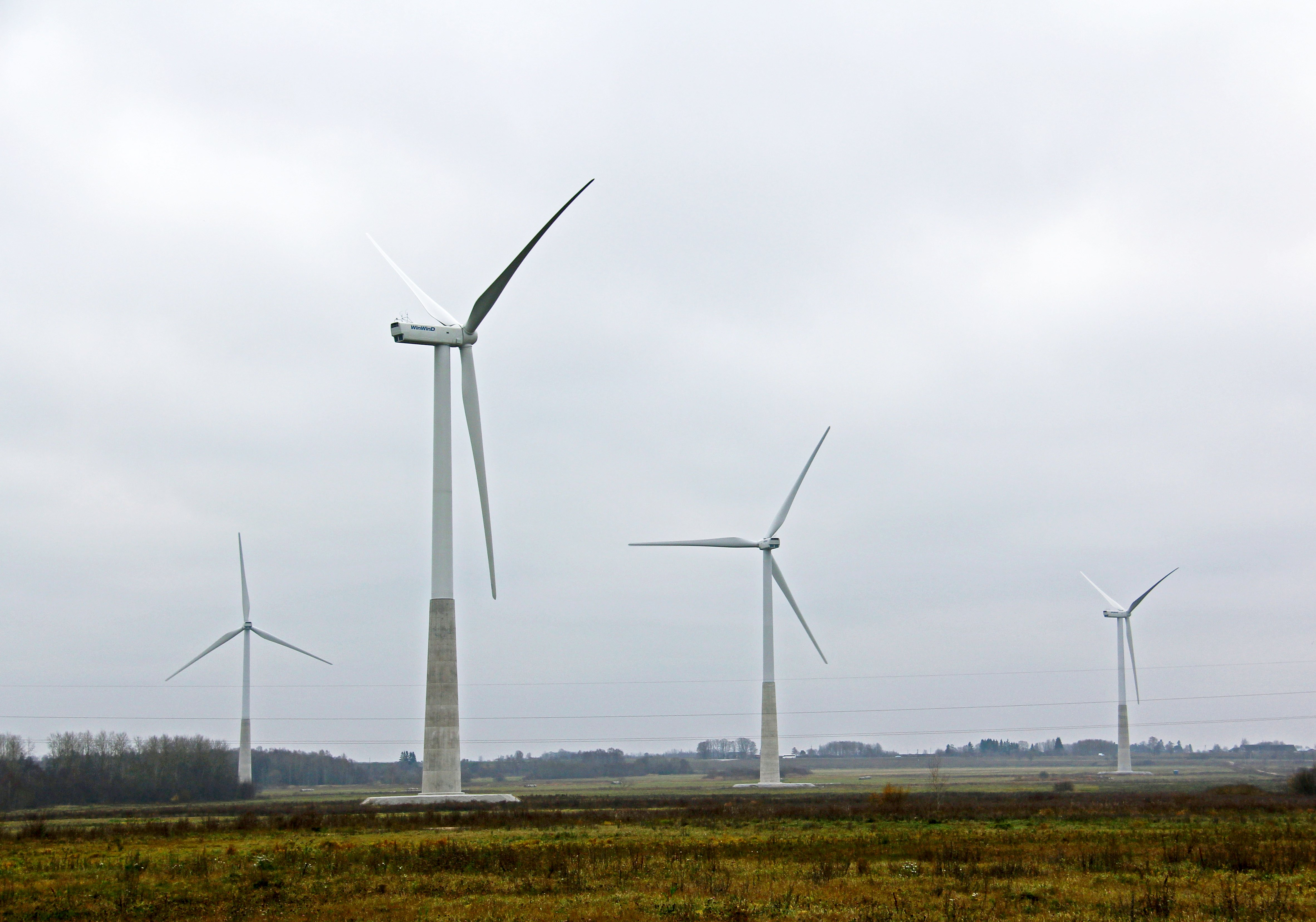 Eesti tuulegeneraatorid